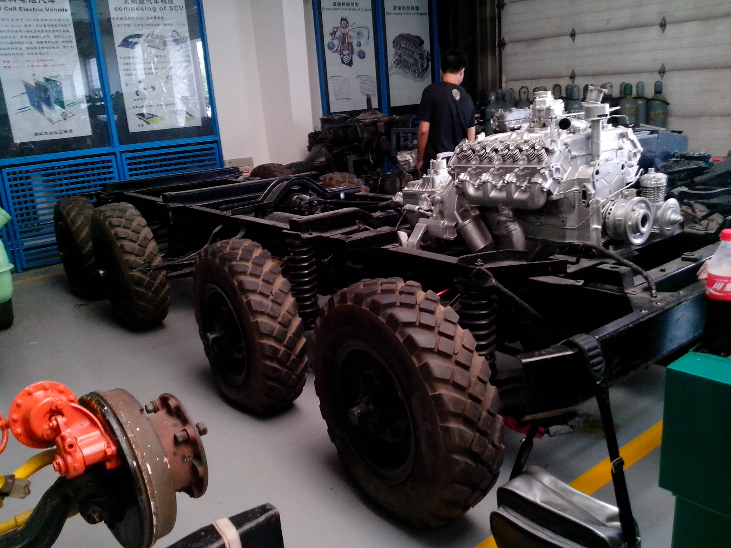 中文（中国大陆）: 吉林大学汽车实验室中展示的一辆八轮驱动,前四轮转向汽车底盘.